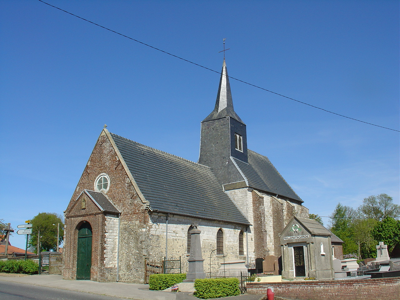 Église de Zoteux